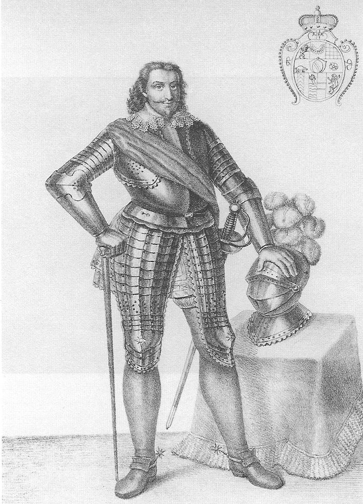 Motiv: Markgraf Friedrich V. von Baden